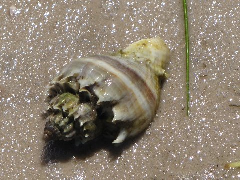 Melongena corona